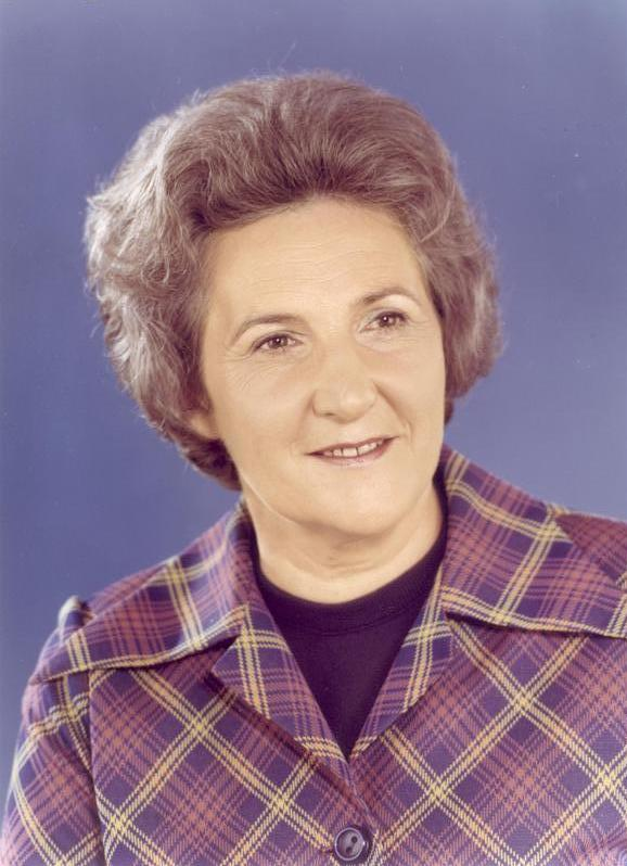 ADN-ZB/Dewag/ 20.12.76 Ingeburg Lange, Kandidat des Politbüros des ZK der SED, Sekretär des ZK Aufnahmedatum 21.9.76